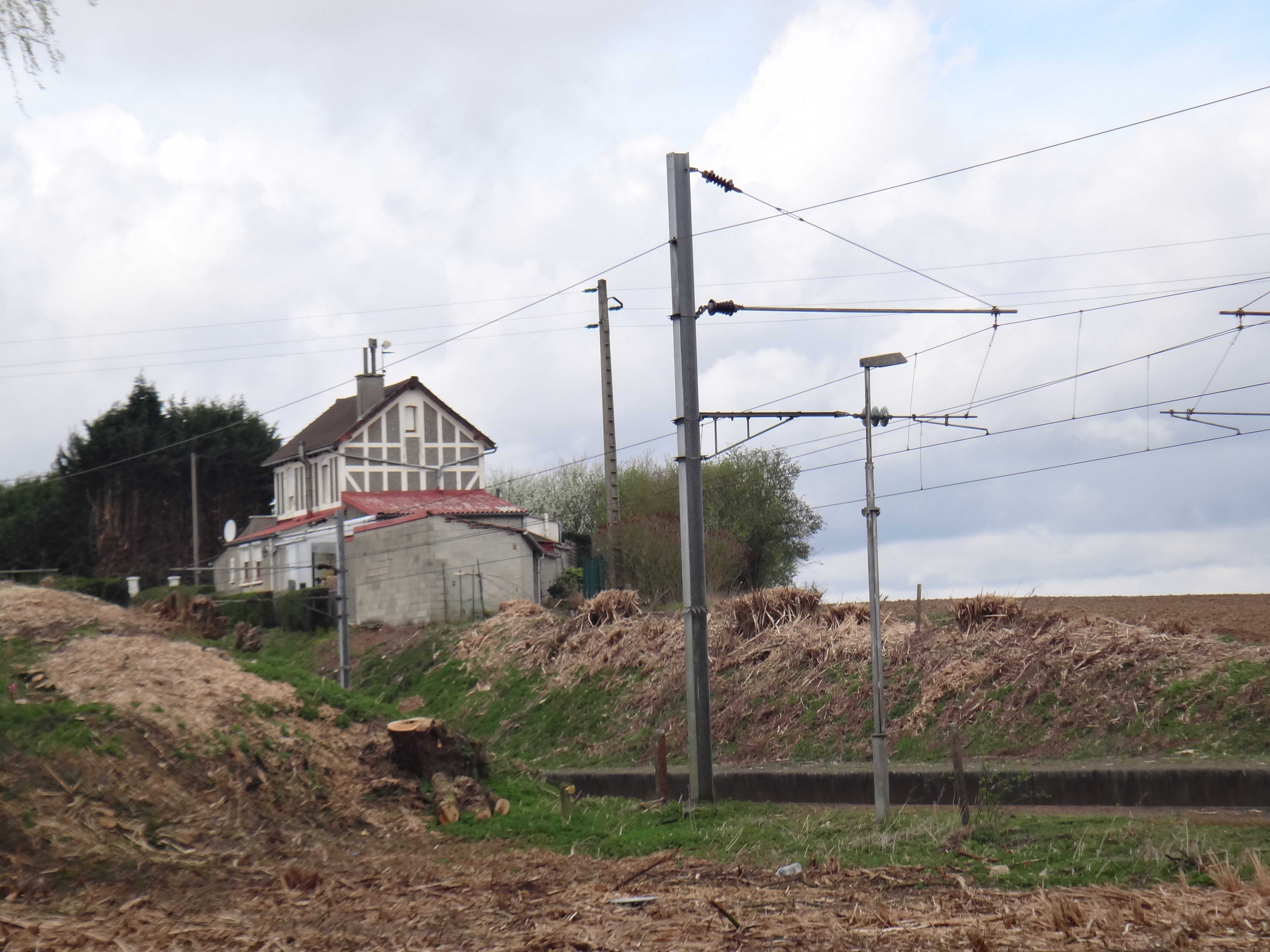 Gare de Wambaix, Nord, France, en 2014